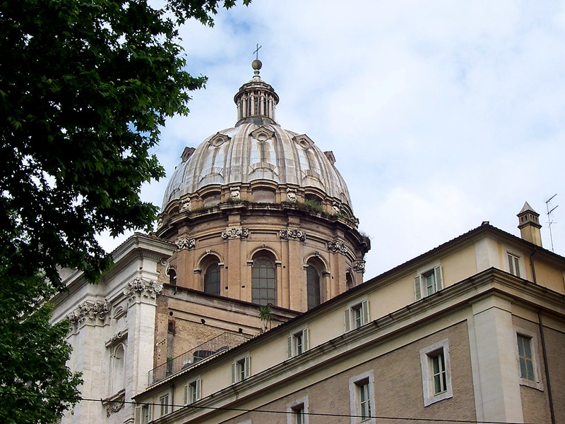 Roma - Cupola della Chiesa di S. Carlo ai Catinari